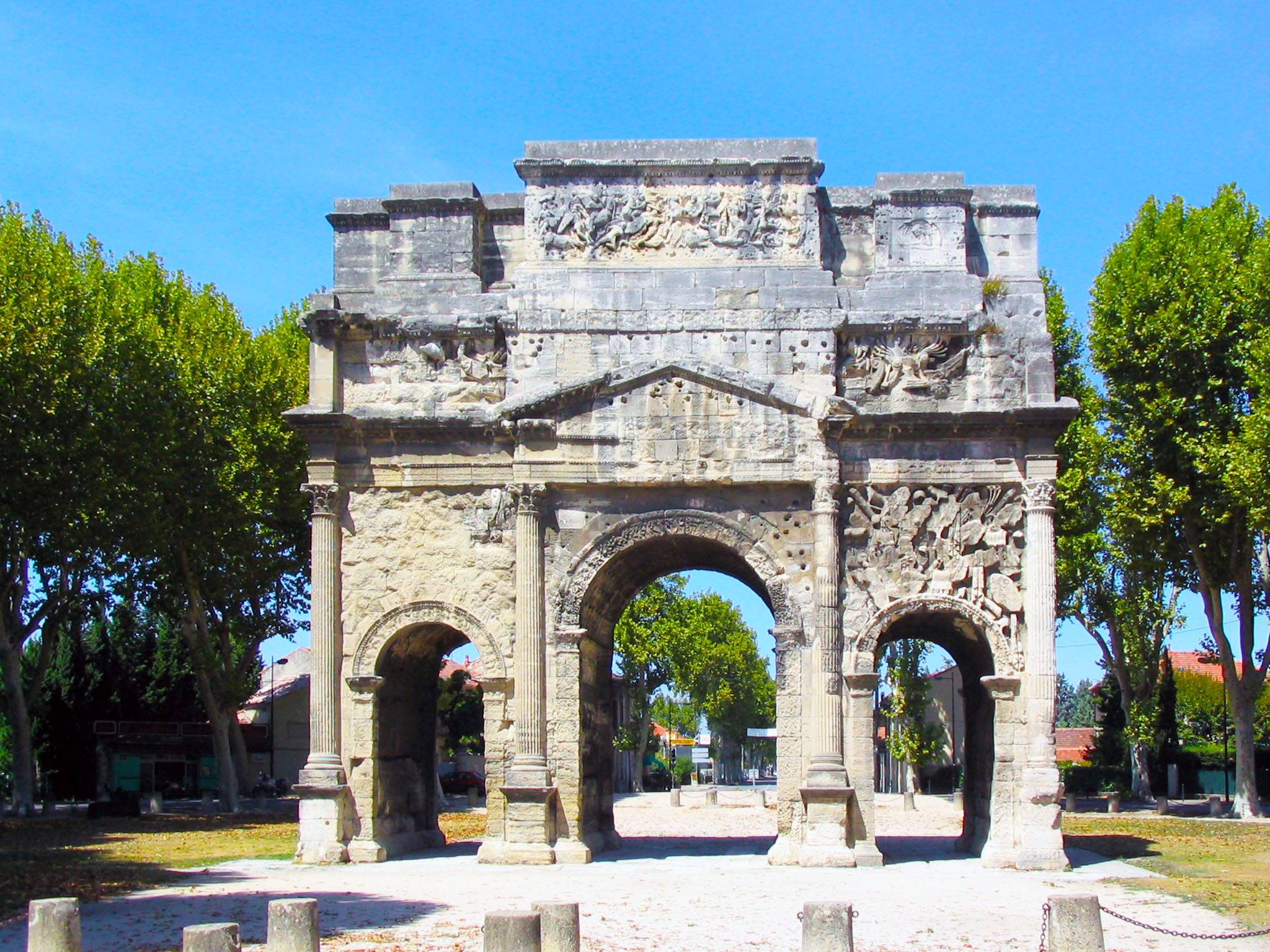 Ehren- oder Stadtgründungsbogen in Orange